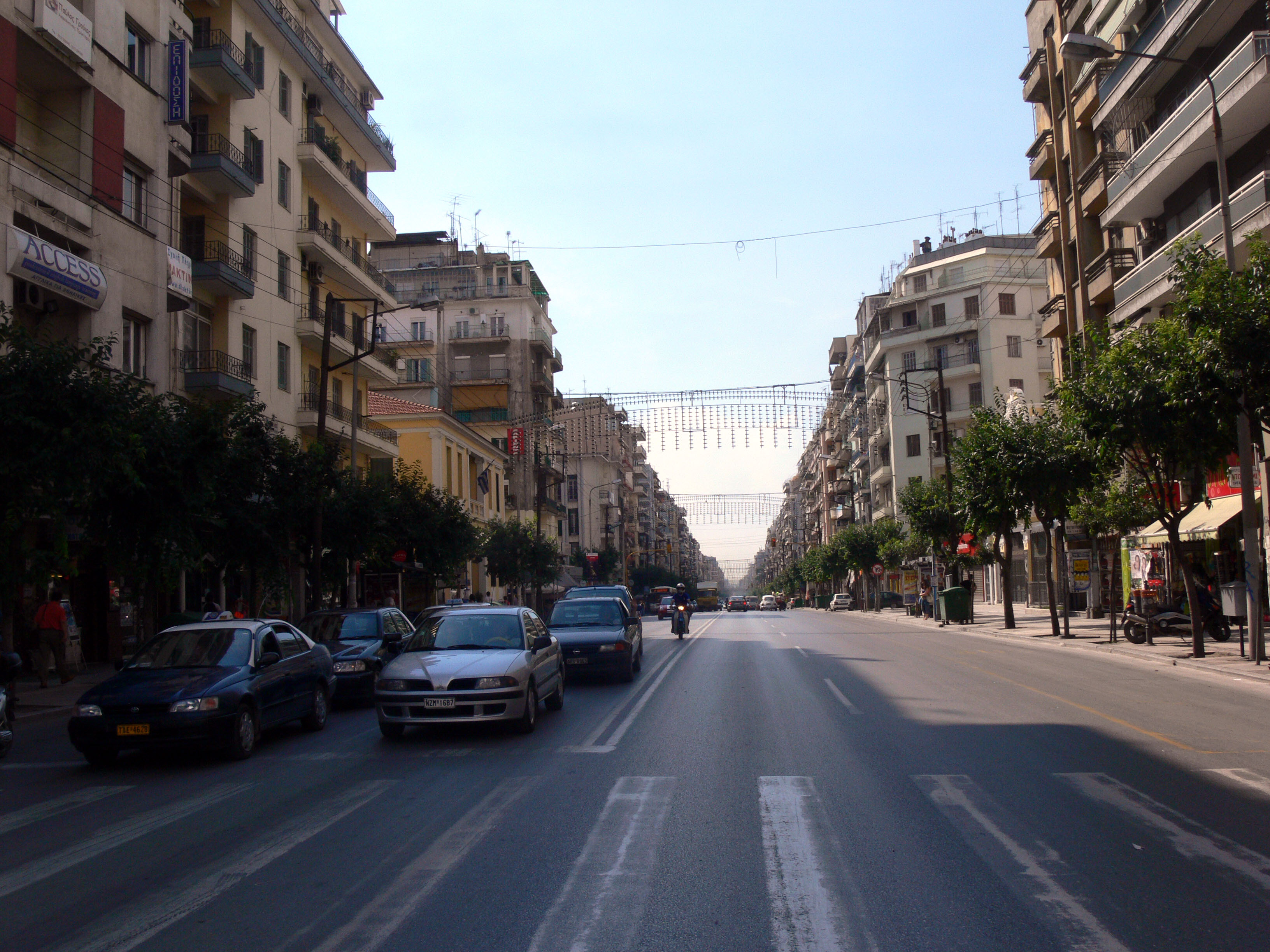 Thessaloniki. Egnatia-Straße